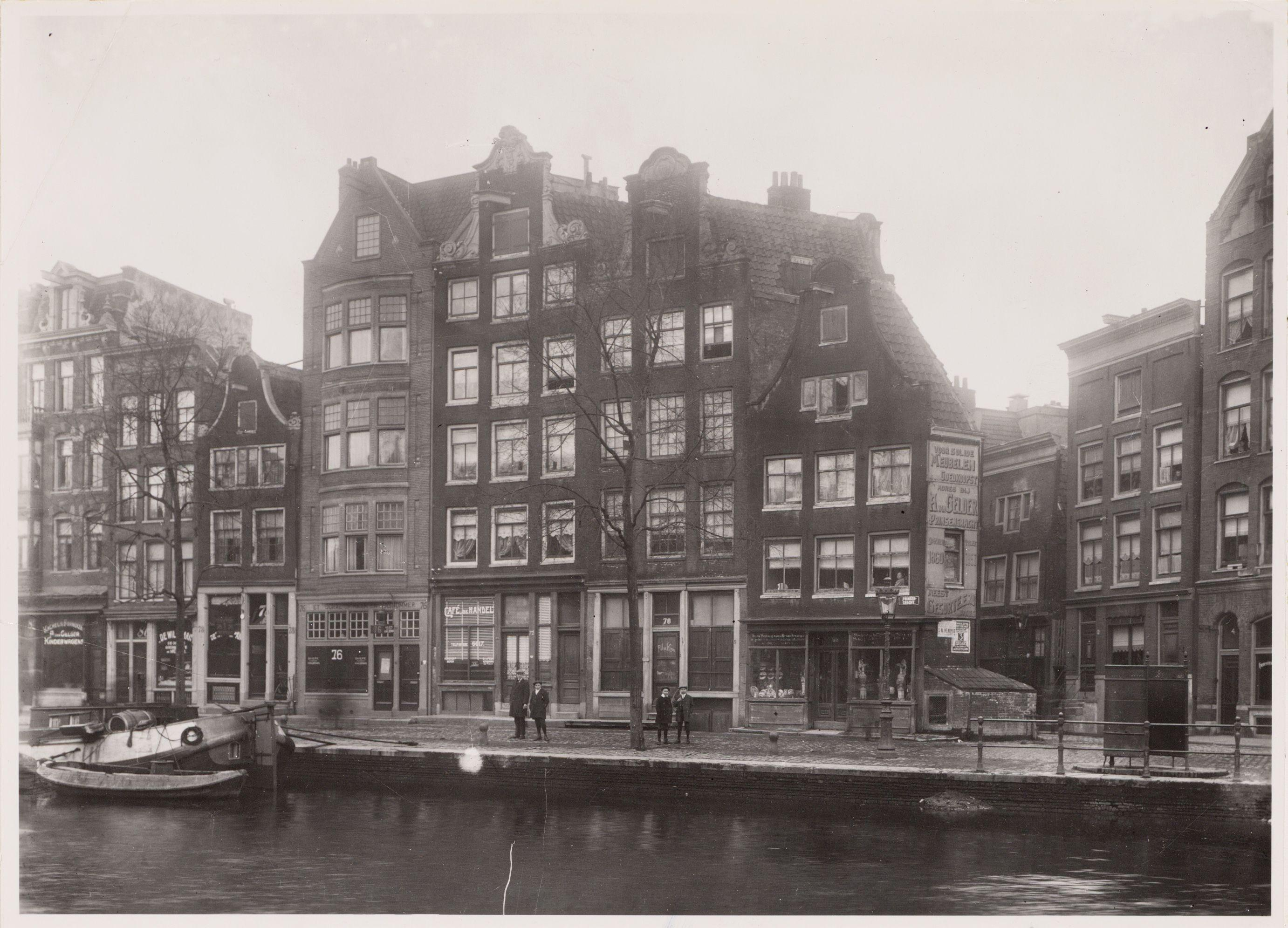 Beschrijving Prinsengracht 68-82 (v.r.n.l.). Nummer 74 niet opgenomen. Rechts de ingang van de Tuinstraat 4-8 (v.r.n.l.). Gebouw 68 is in 1950 gesloopt Rechts is de ingang van de Tuinstraat. Documenttype foto Vervaardiger Onbekend Anoniem Collectie Archief van het Bureau Monumentenzorg: glasnegatieven en negatiefloze foto's Datering 1940 ca. Geografische naam Tuinstraat Prinsengracht Inventarissen Afbeeldingsbestand 012000002487